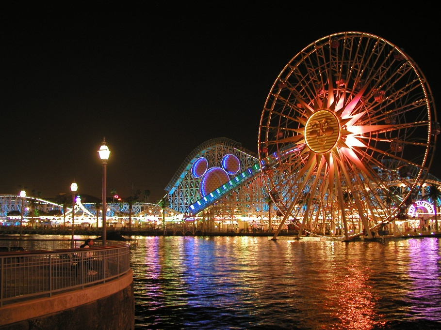 Sun Wheel at night. Taken from Image:Sun Wheel at night.jpg